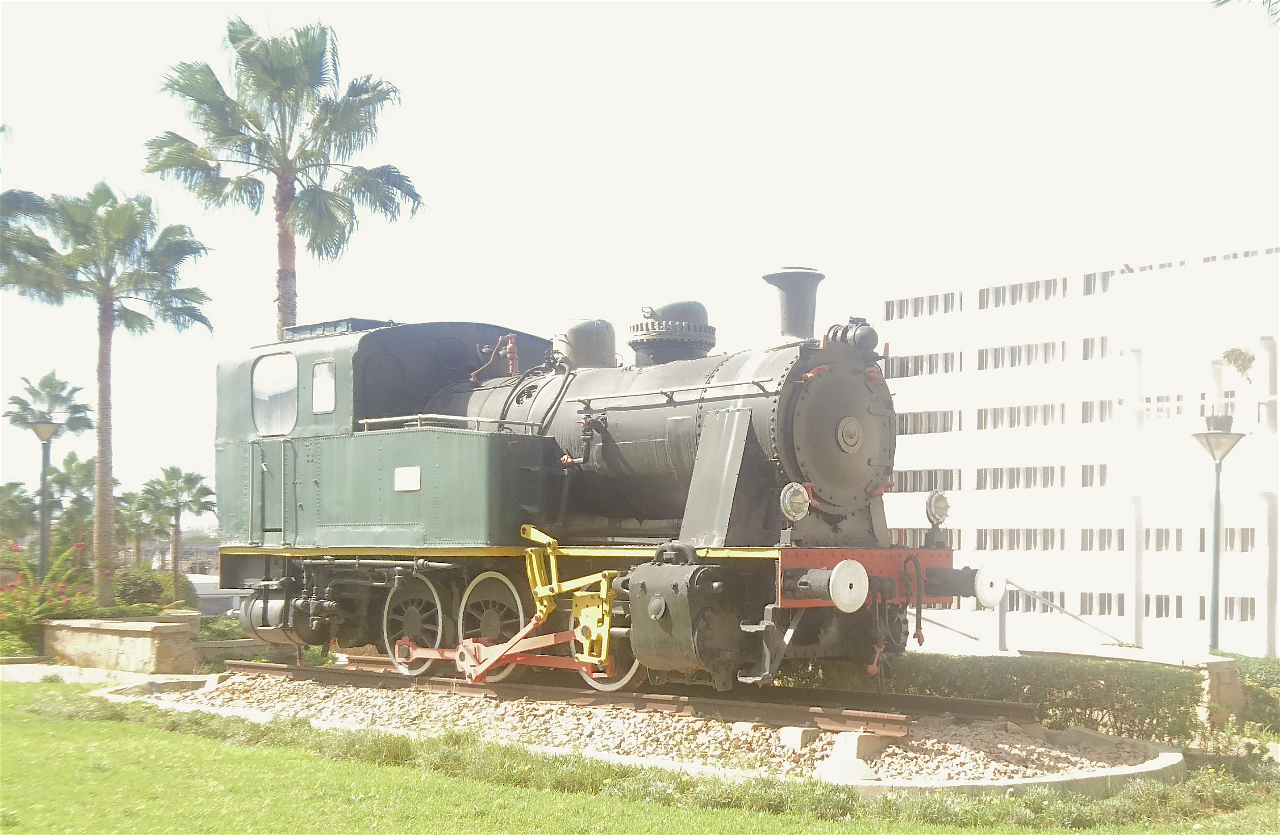 Locomotive Henschel 030 TX1 devant les locaux de l'ONCF à Rabat